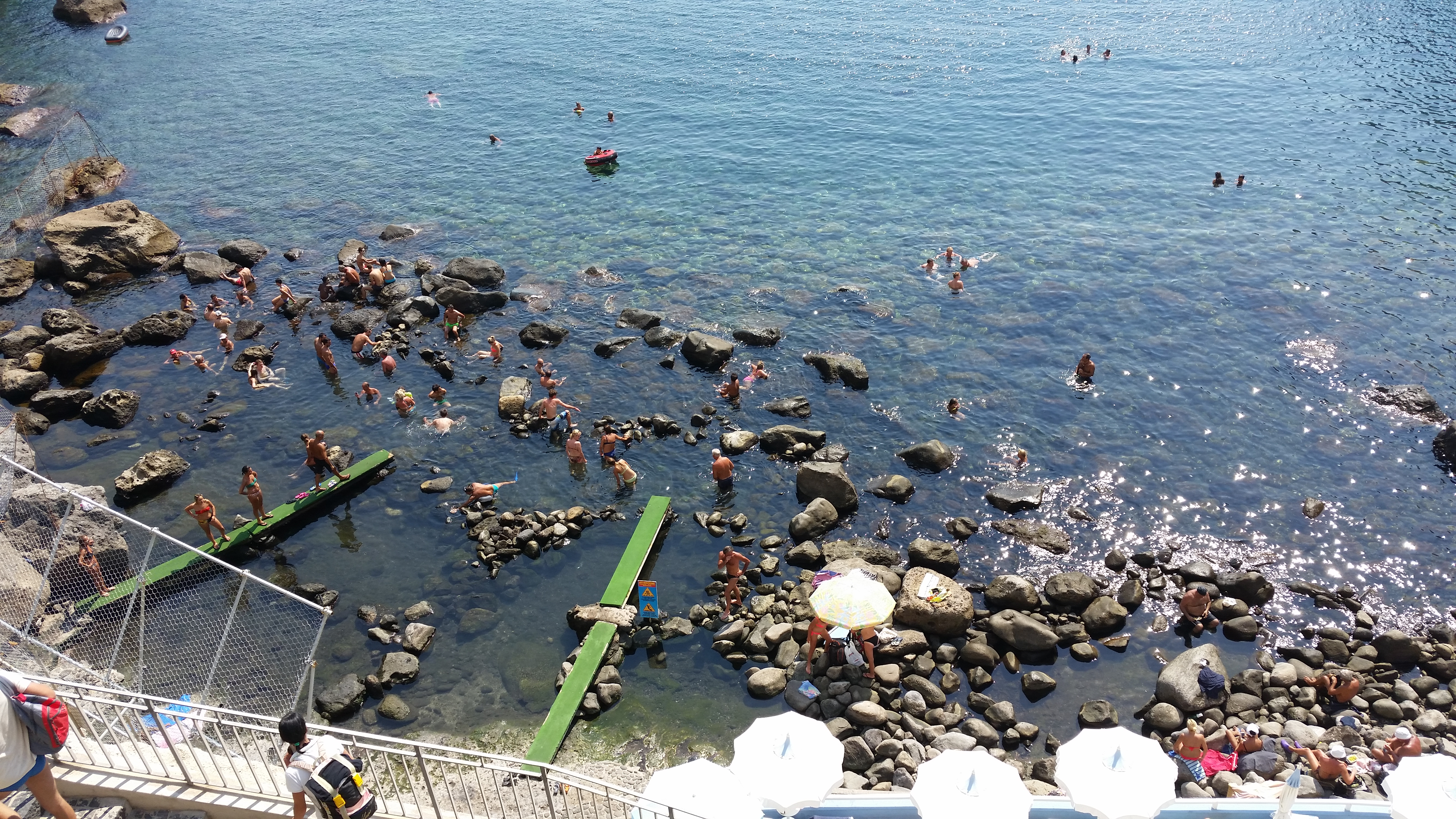 Baia di Sorgeto, si trova a Ischia ed è una fonte naturale di acqua calda, bollente.